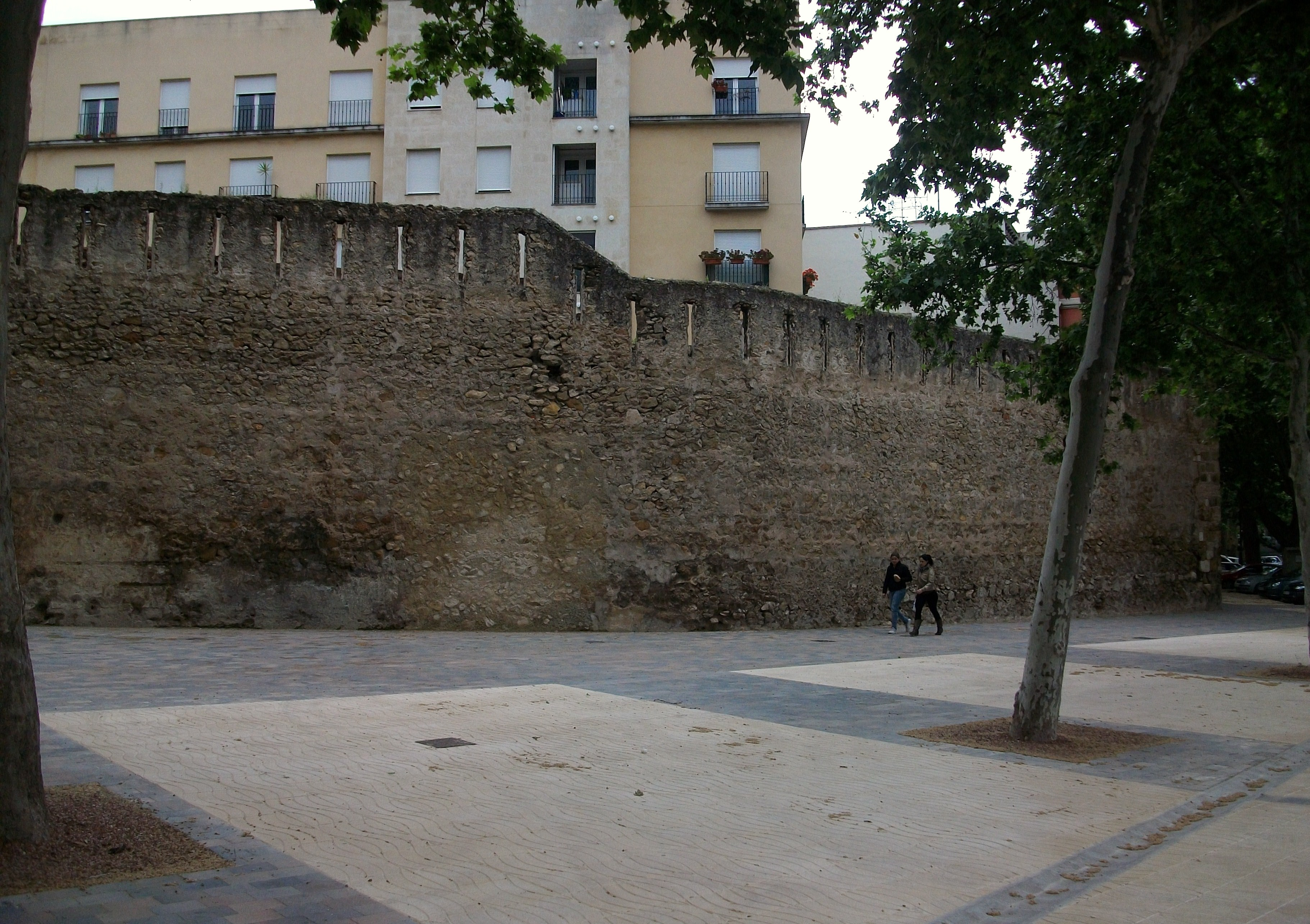 Tram de muralla prop del jardí del Bes, Xàtiva.